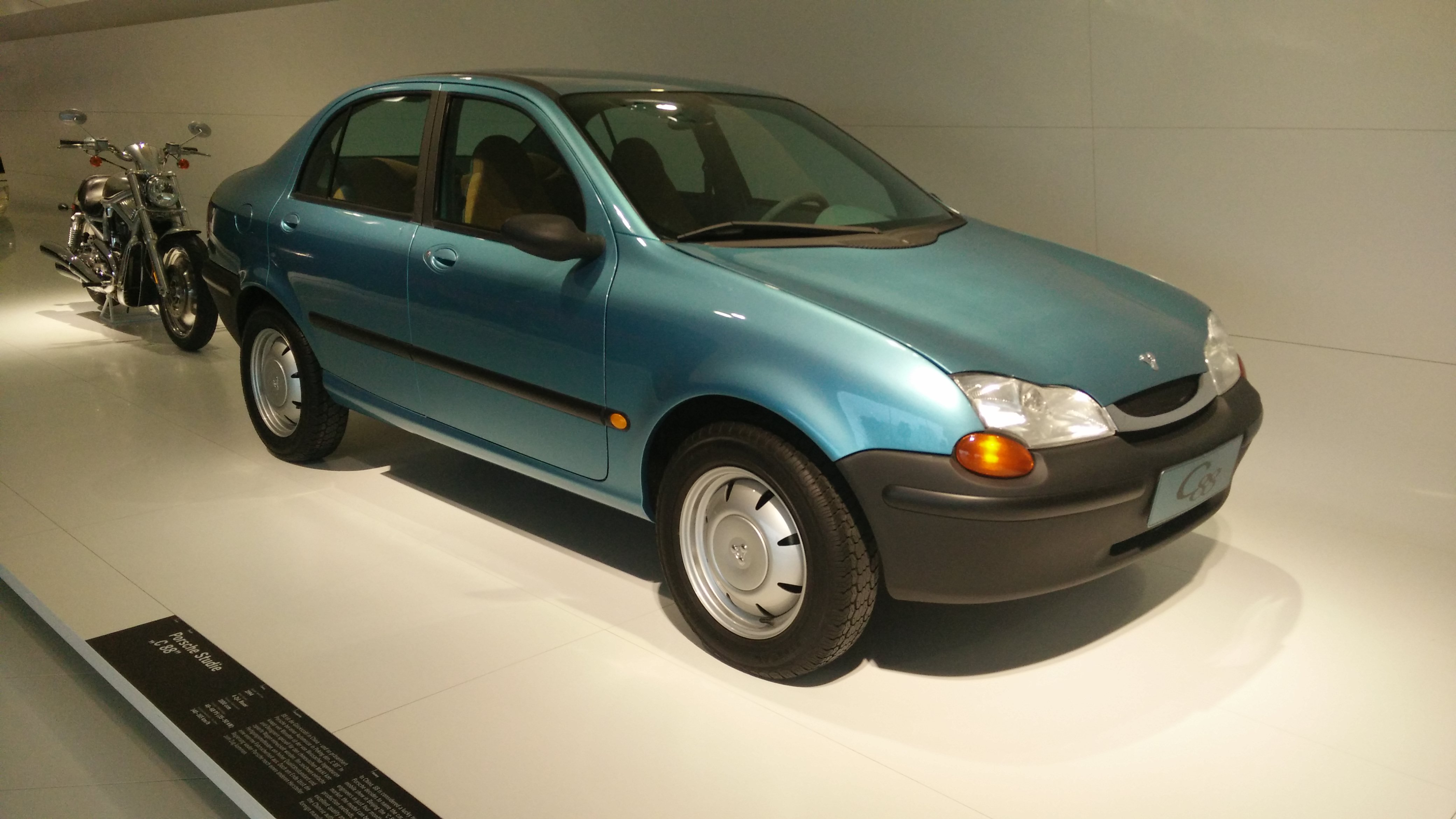 IMG_20141112_123627